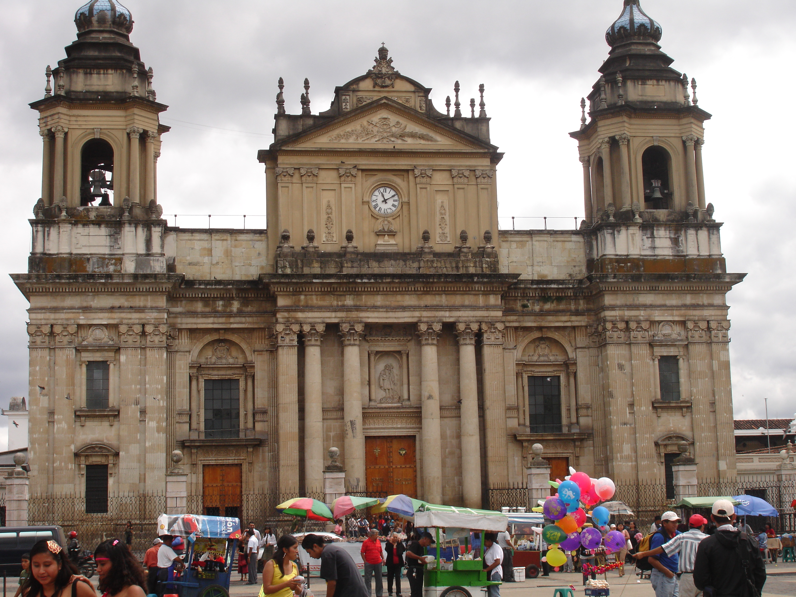 Ubicado en zona 1, Capital de Guatemala